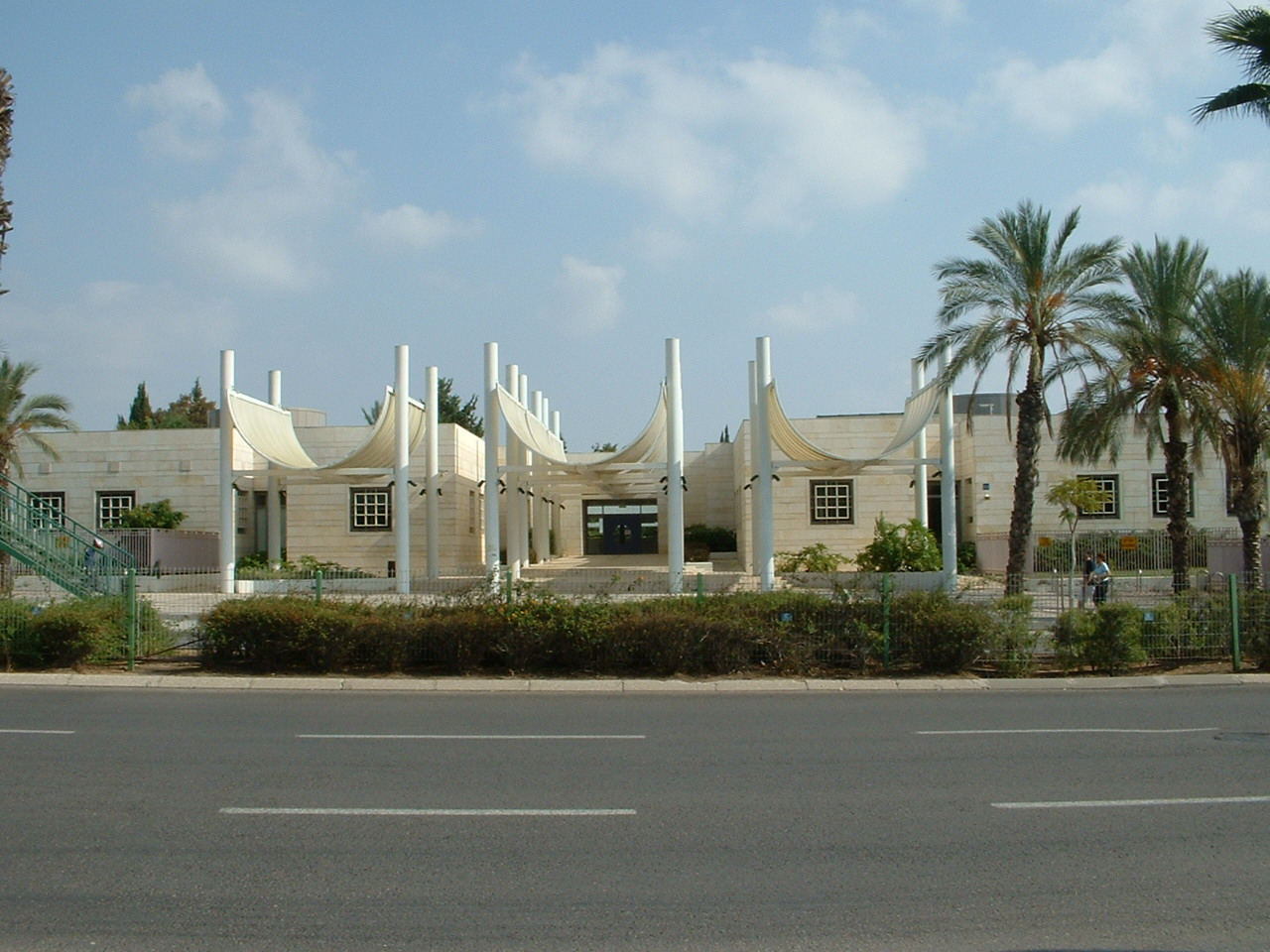 מכללת אפקה, תל אביב